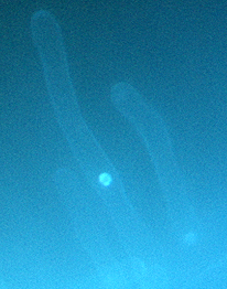 Zellkern, aus einem Wurzelhaar bei Medicago truncatula, mit DAPI angefärbt, bei 400x Vergrößerung